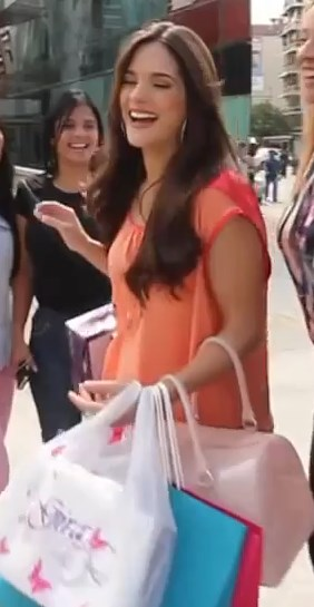 Sabrina Seara en el comercial Spot Gira Shoes 2012